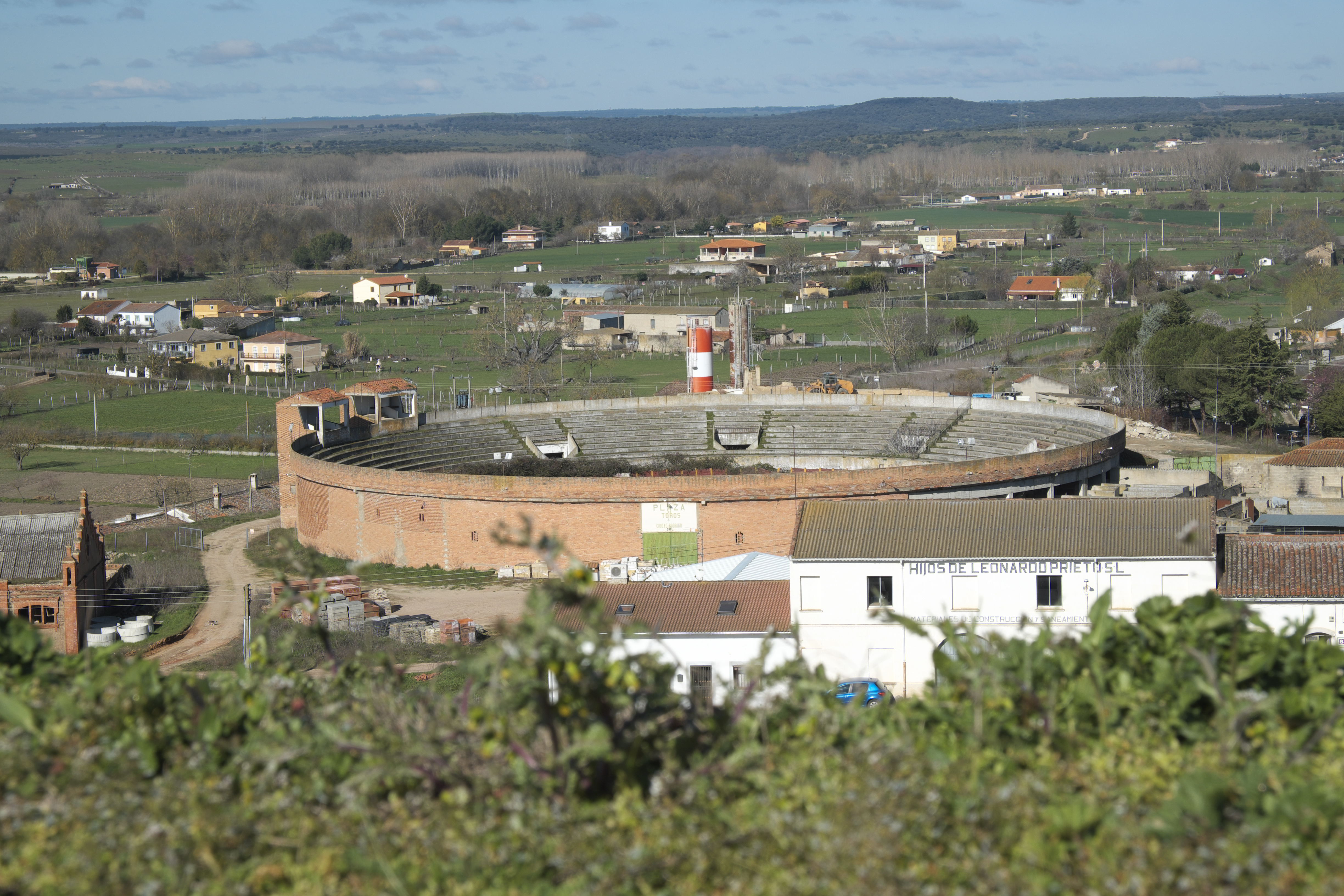 Stierkampfarena in Ciudad Rodrigo in der Provinz Salamanca (Kastilien-León/Spanien)